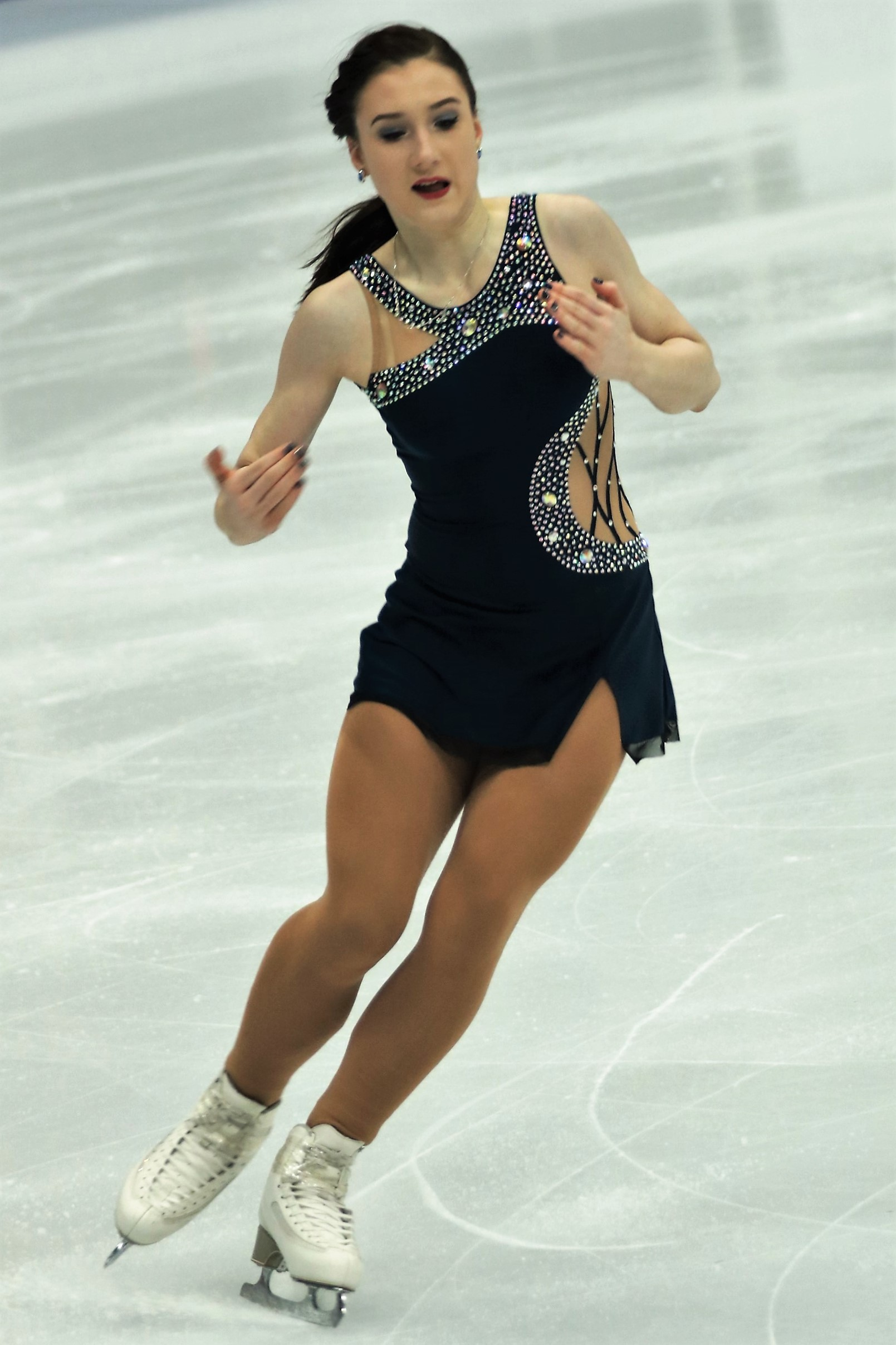 Кристина Шкулета-Громова (Эстония) на Чемпионате Европы по фигурному катанию 2018.